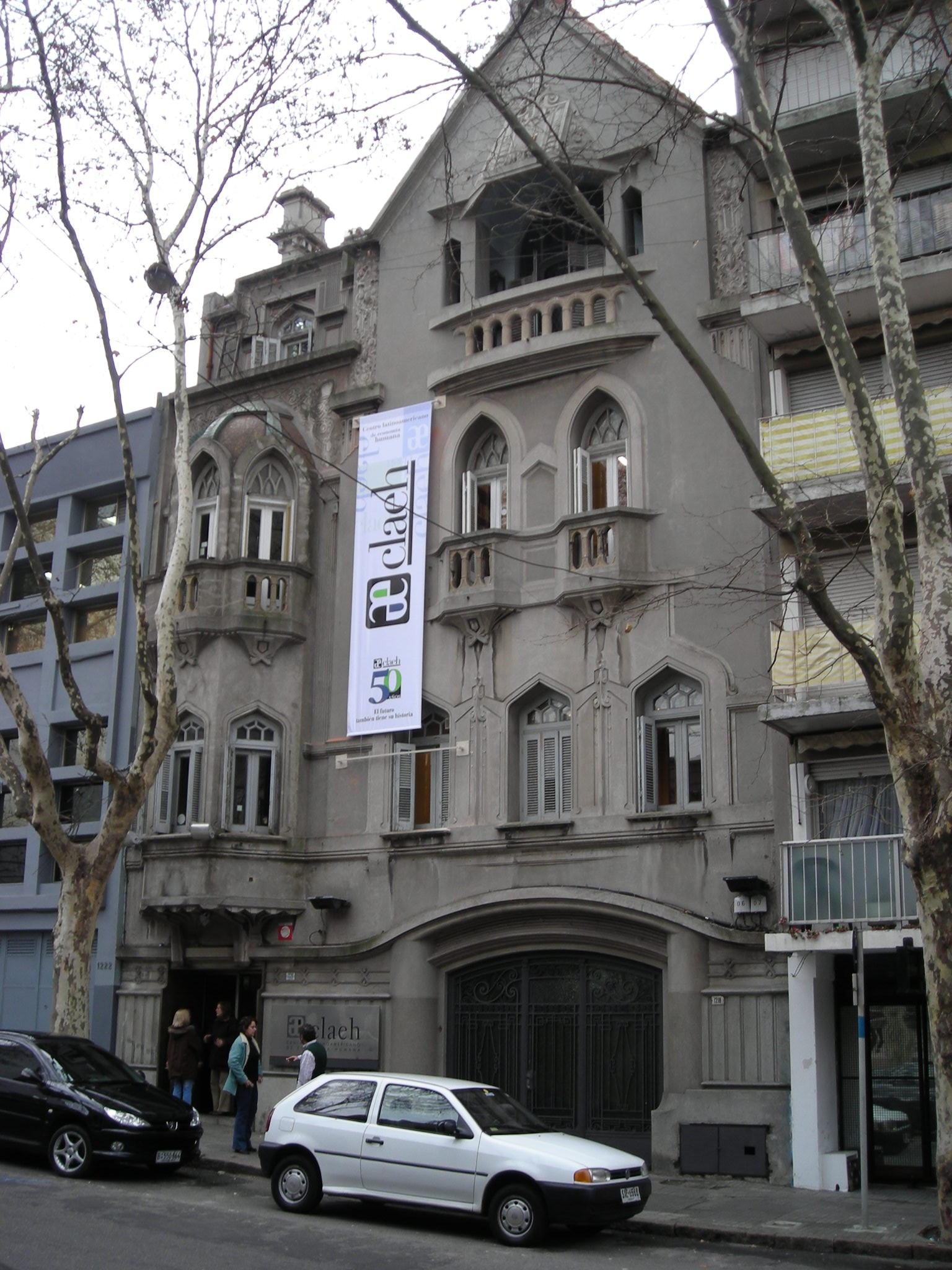 Casa Fein, actual sede del Centro Latinoamericano de Economía Humana en Montevideo.